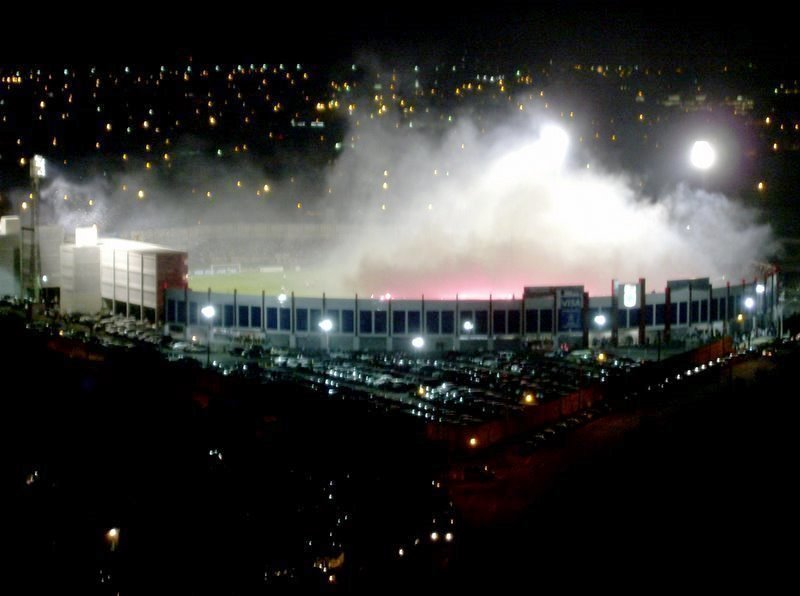 foto noturna da vila capanema